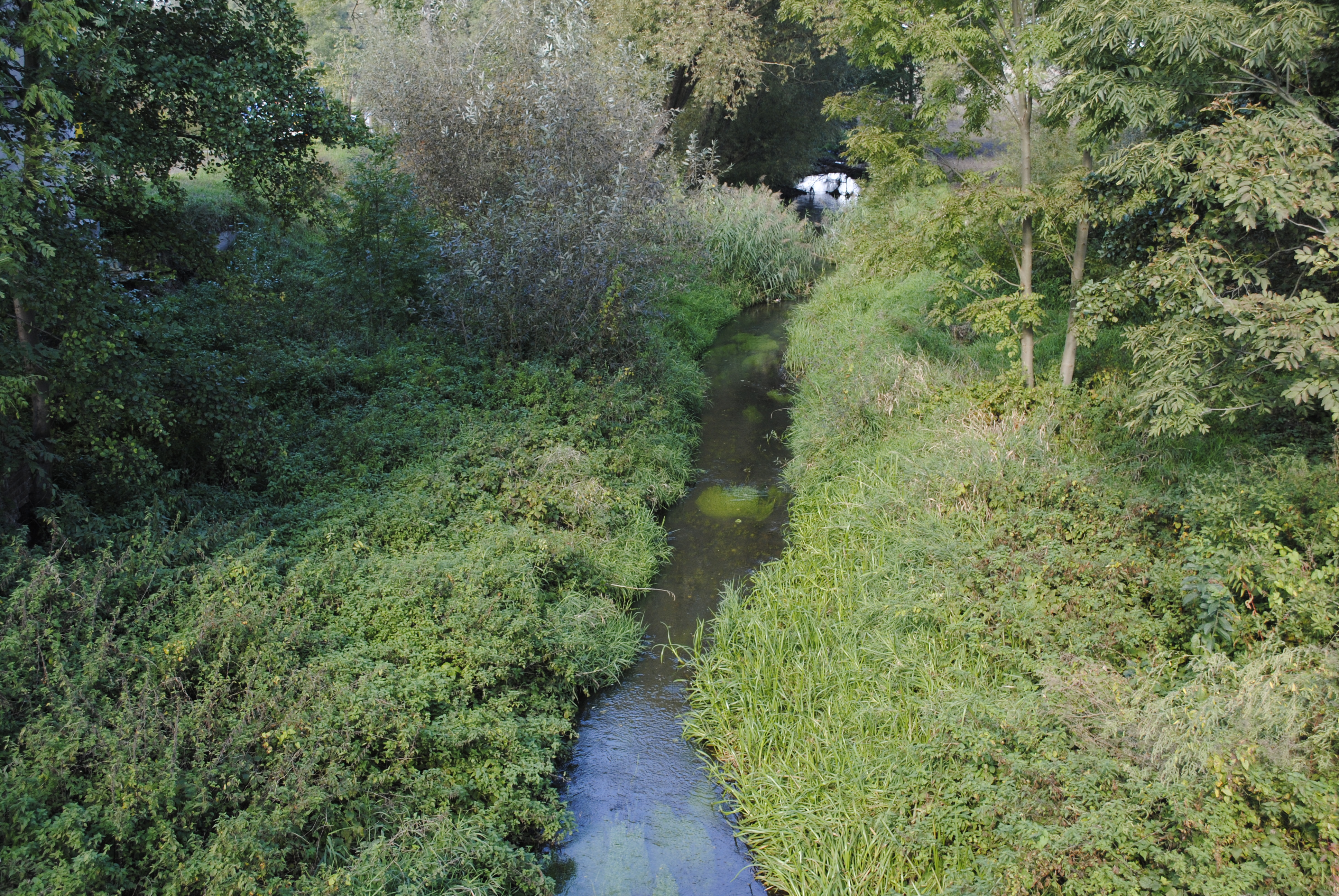 Swornica, Bach im oberschlesischen Dorf Kepa bei Oppeln